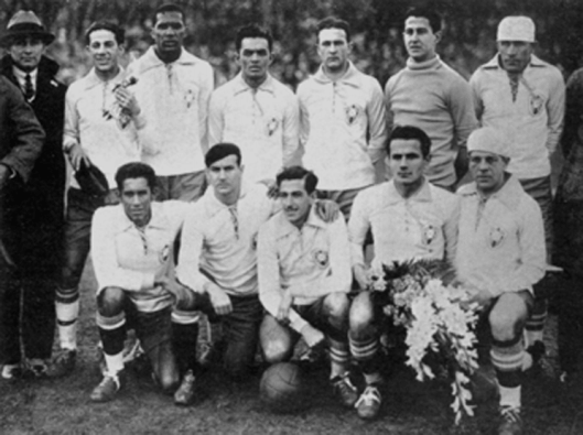 Uniforme selección de Brasil de 1930